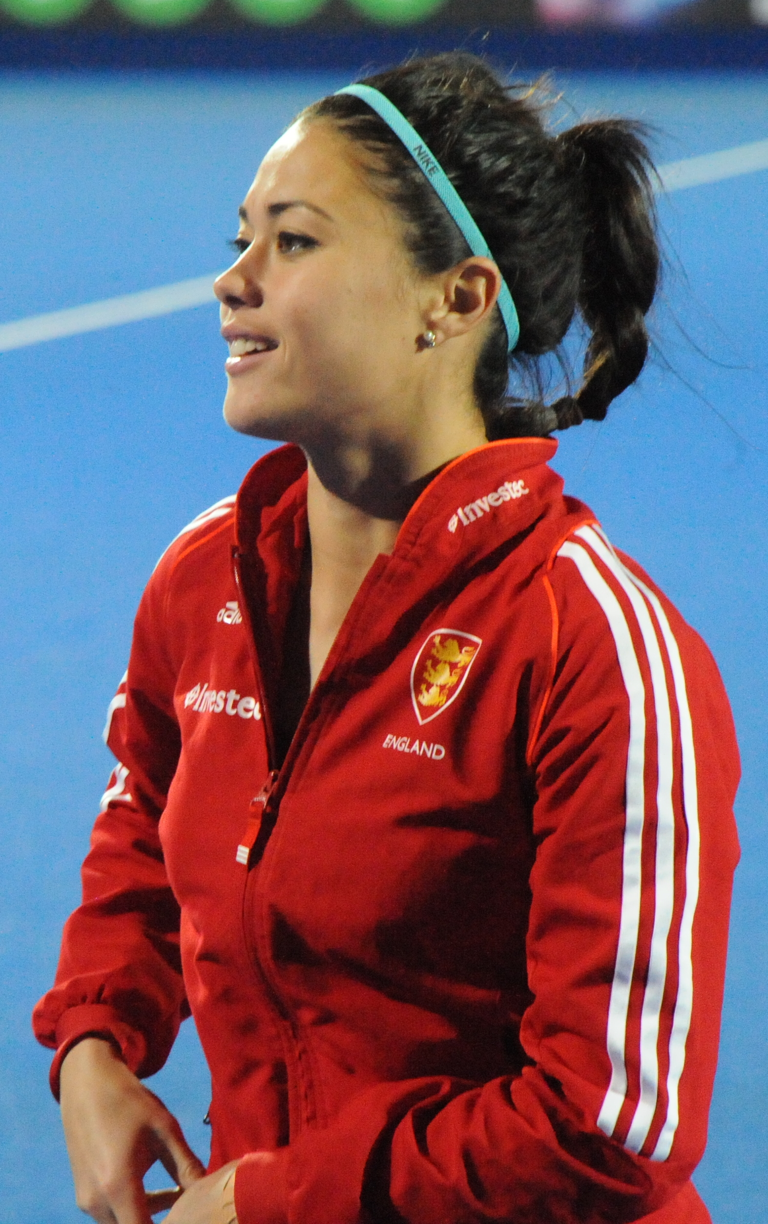 Sam Quek